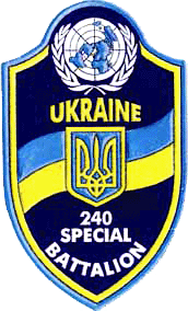 Шеврон 240-ого спеціального батальйону